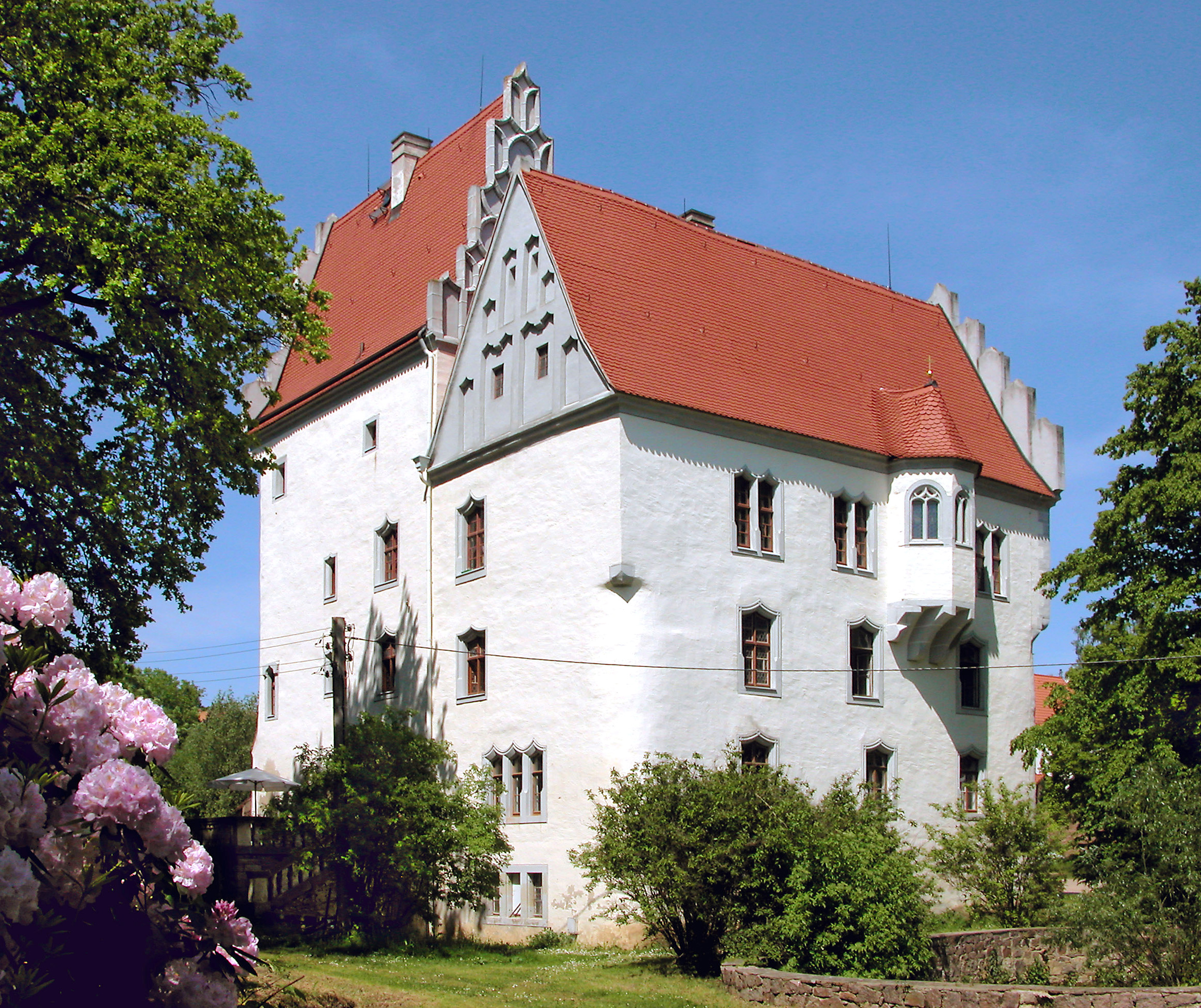 Renaissanceschloss Heynitz (16. Jh.). Sicht von Osten. Im polygonalen Erker im zweiten Obergeschoss befindet sich der Chor der Schlosskapelle.